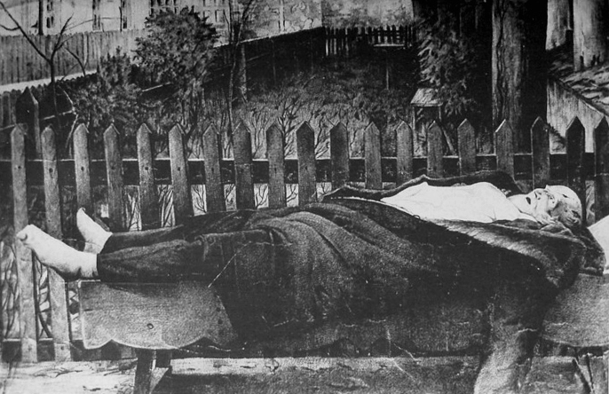 Тіло замордованого російськими солдатами князя Романа Даміана Санґушка. Славута, 1917 рік.